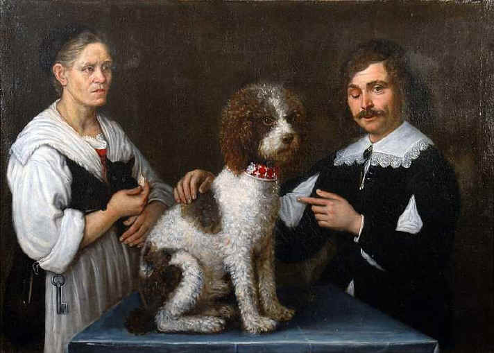 Guercino con la sorella Lucia (?) e un cane, Coll. privata, Roma